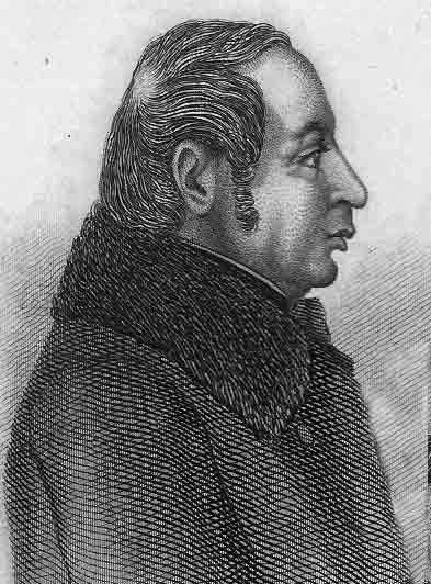 Johan Johansson (1792-1890)